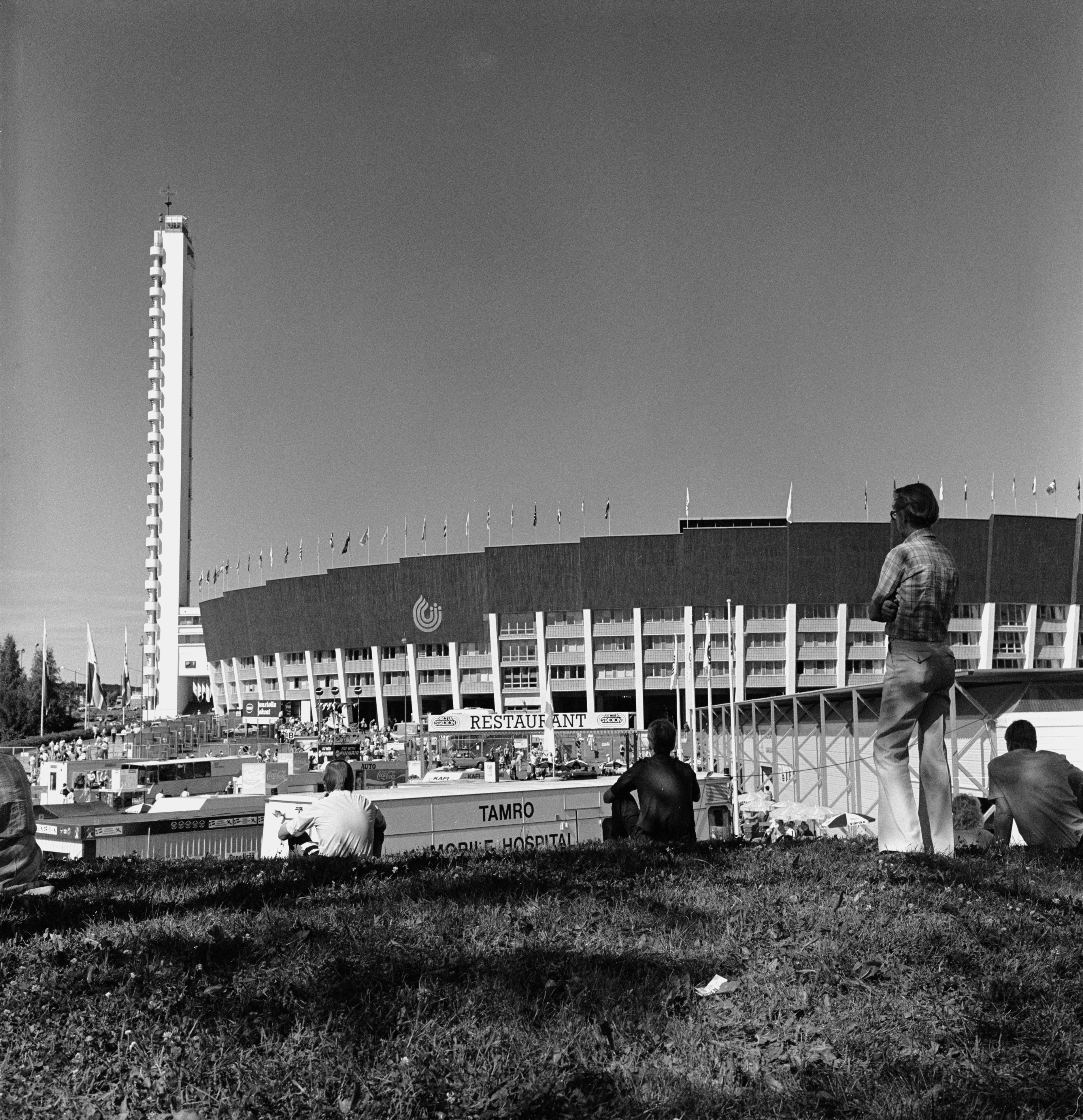 Yleisurheilun ensimmäiset maailmanmestaruuskisat Olympiastadionilla. Esittely- ja myyntipisteitä stadionin etukentällä.